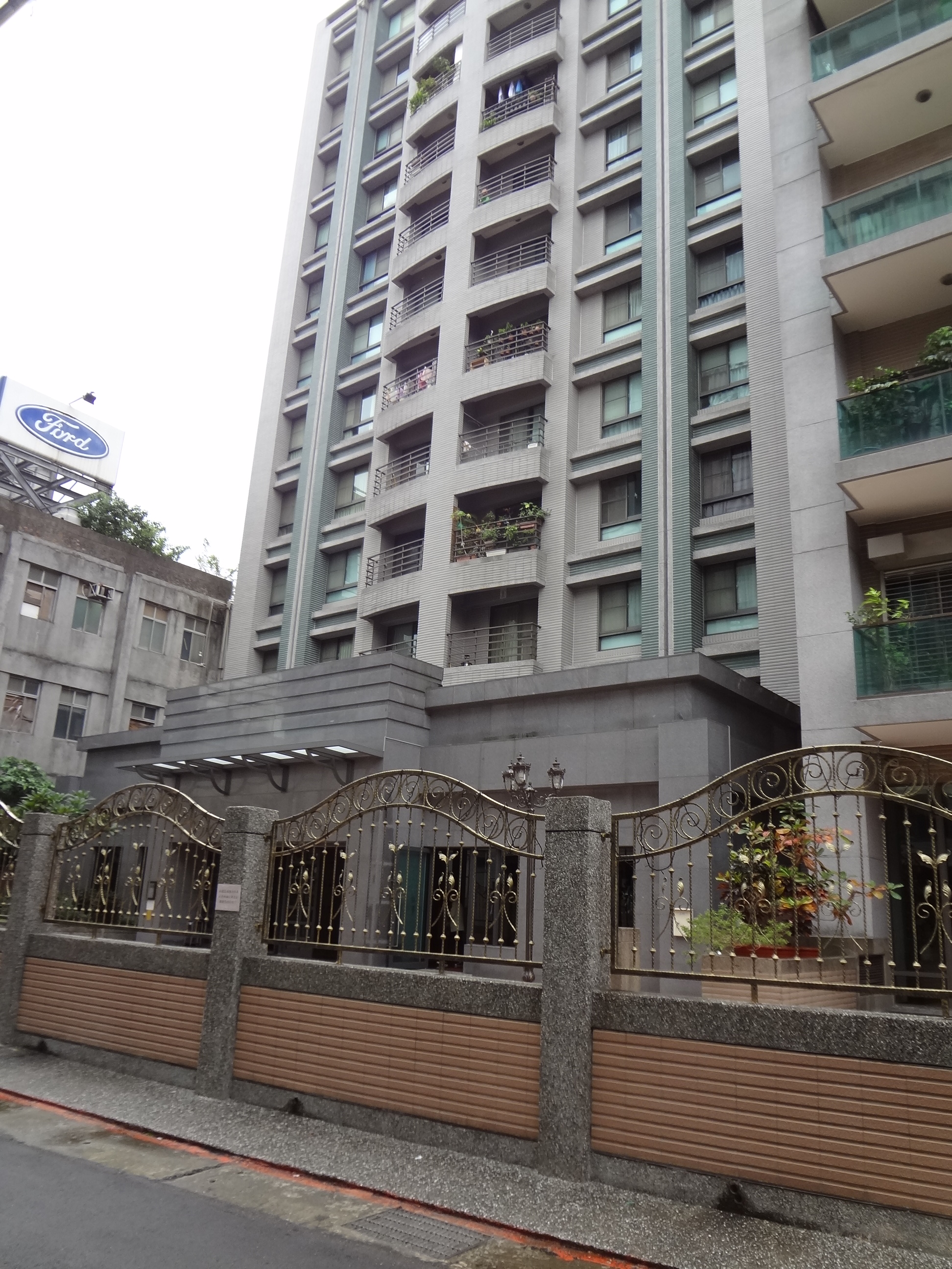 台灣電熱工業南港廠原址，位於臺灣臺北市南港區南港路三段16巷7號。